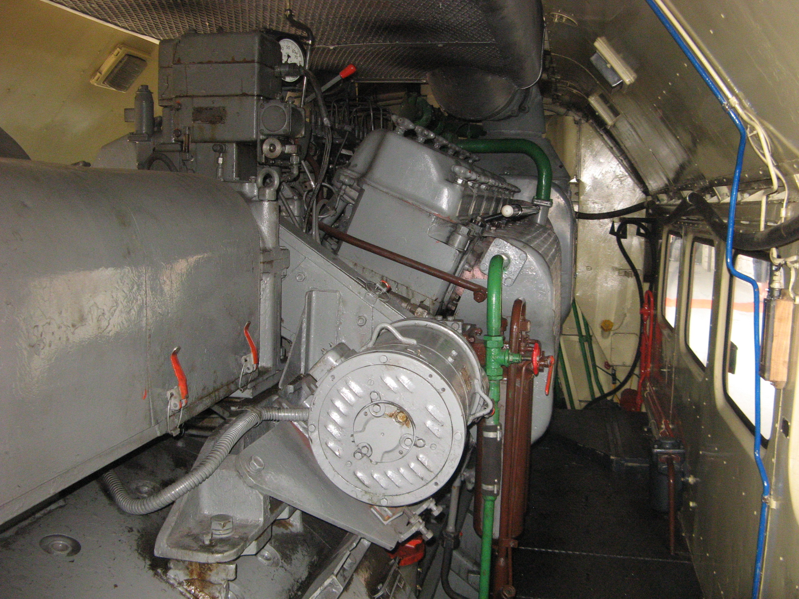 Motor lokomotivy T679.1